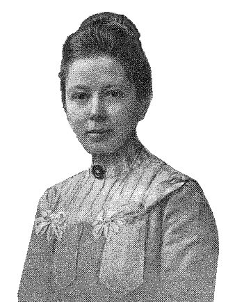 Karoline Gronemann (1869–1911)